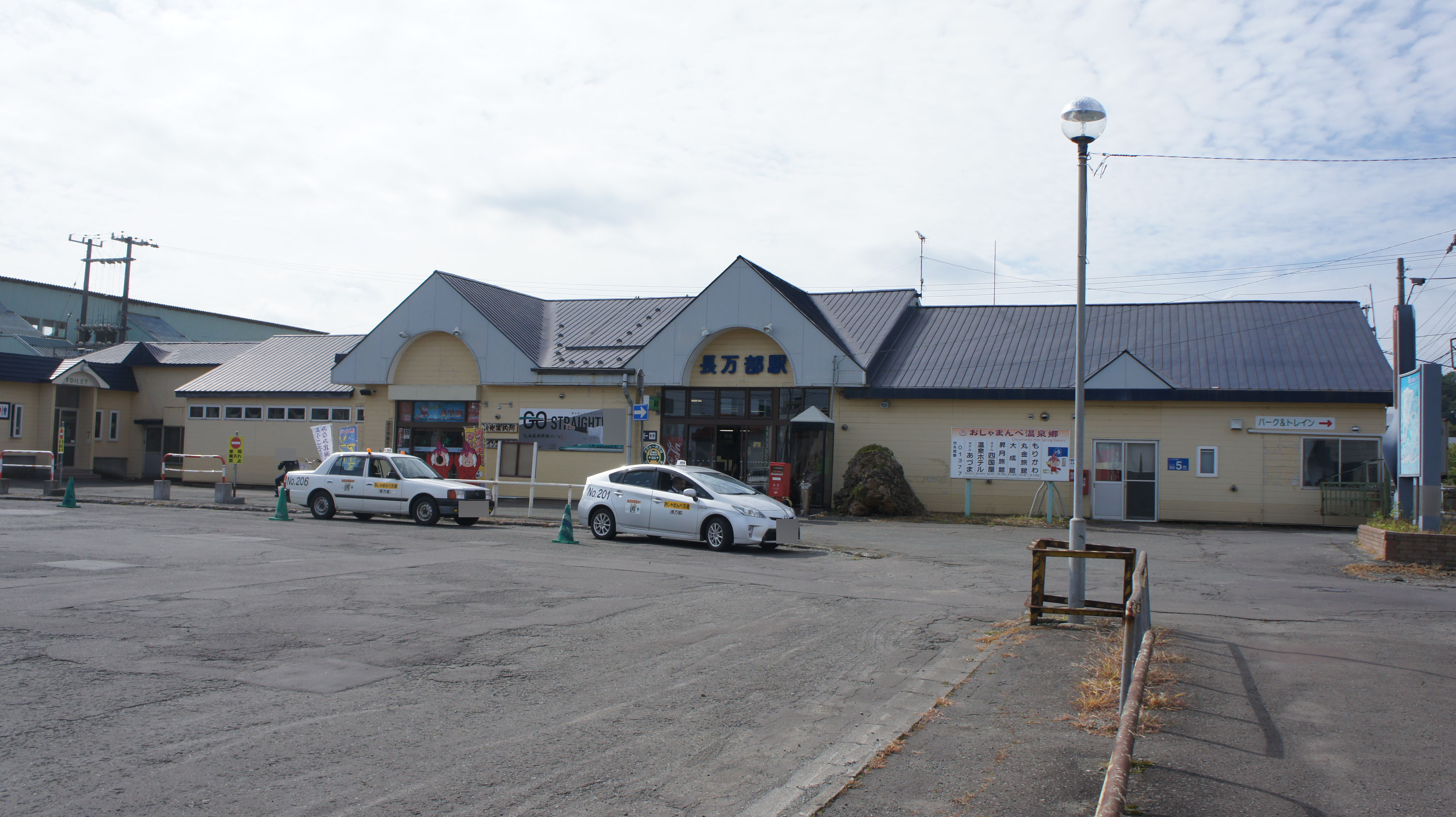 JR函館本線/室蘭本線・長万部駅の駅舎 Sony NEX-3